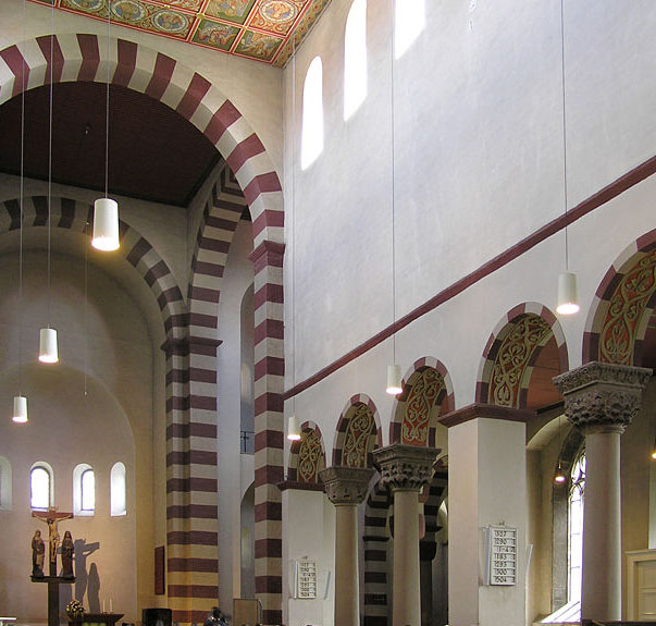 Interno della Cattedrale di San Michele a Hildesheim (Germania)